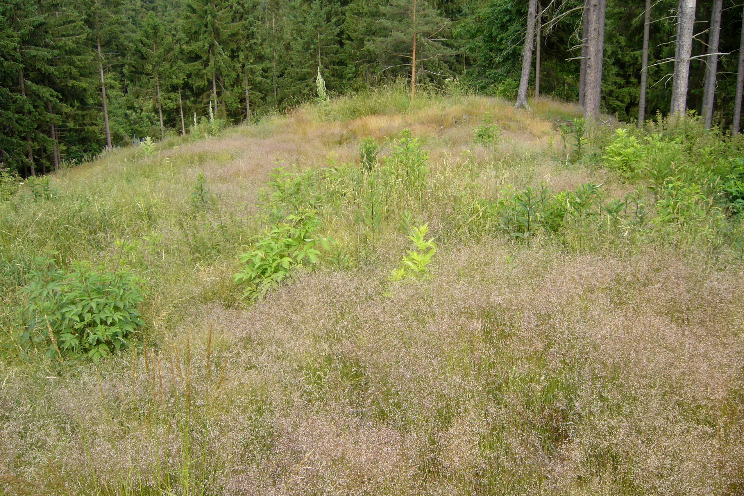 Šontál – hradní jádro